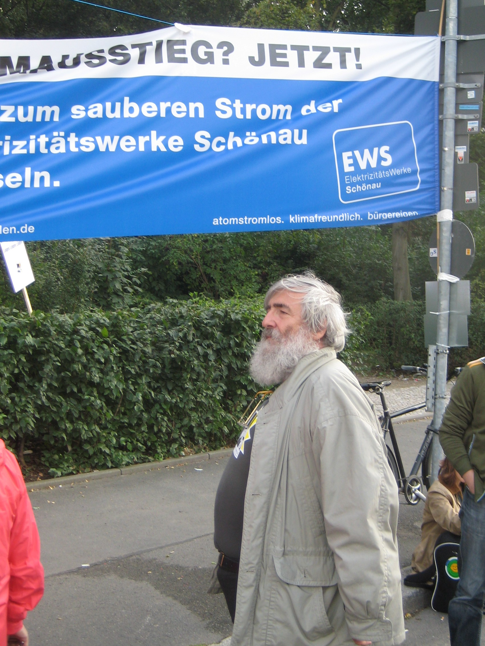 Michael Sladek, Gründer der Elektrizitätswerke Schönau, auf einer Demonstration in Berlin